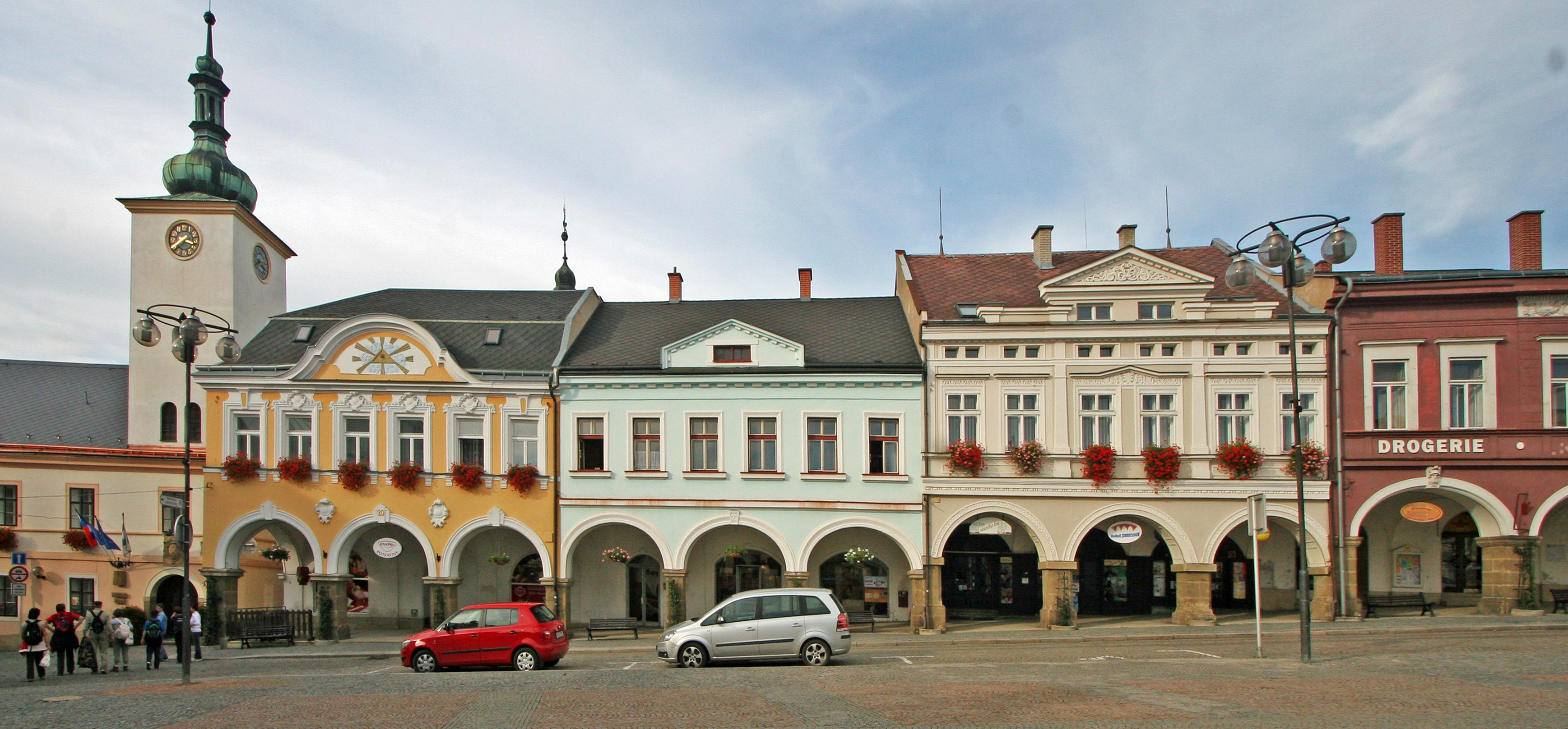 Měšťanský dům (Ústí nad Orlicí), nám. Mírové 20, Ústí nad Orlicí